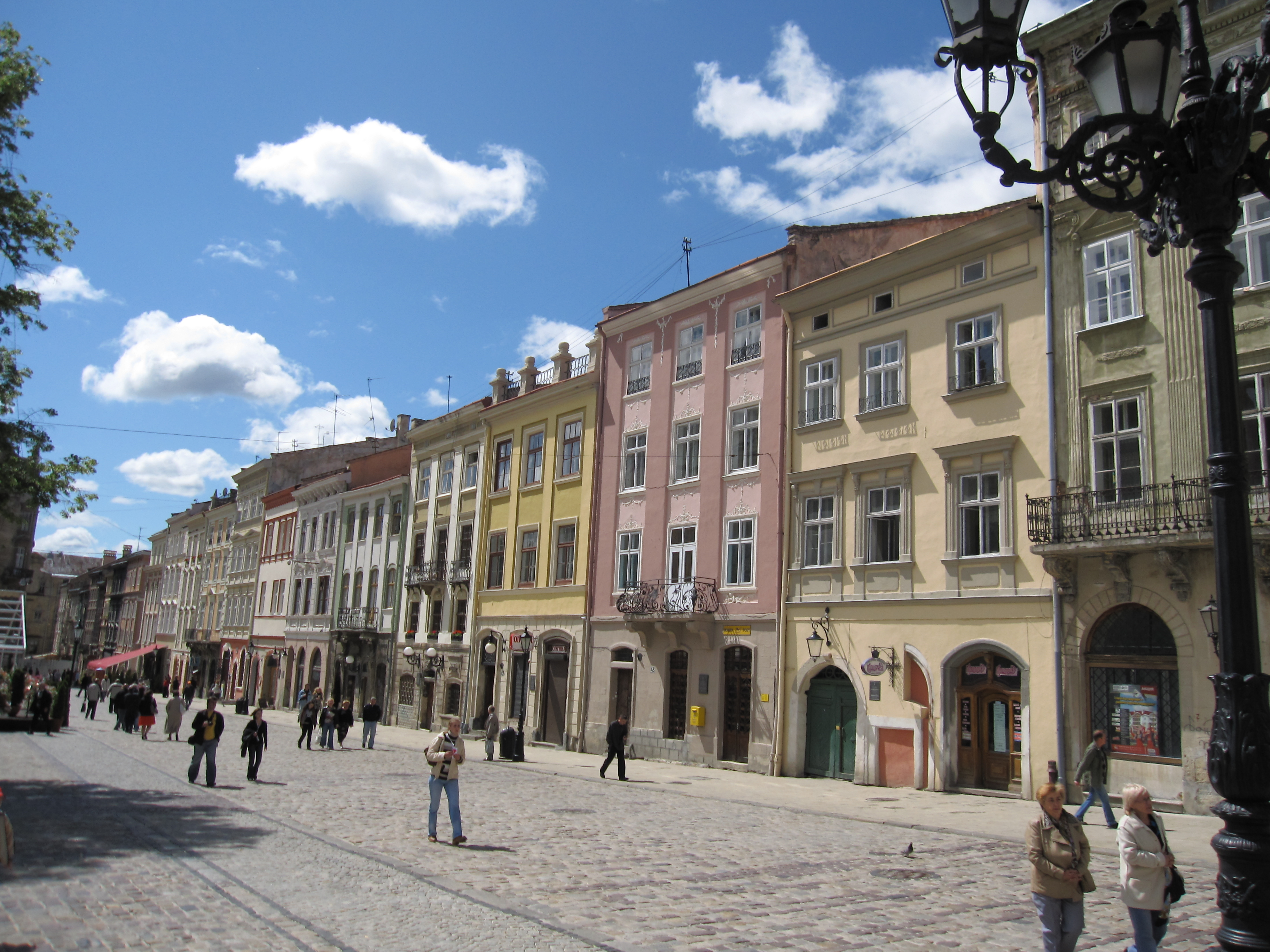 Rynek of Lwow